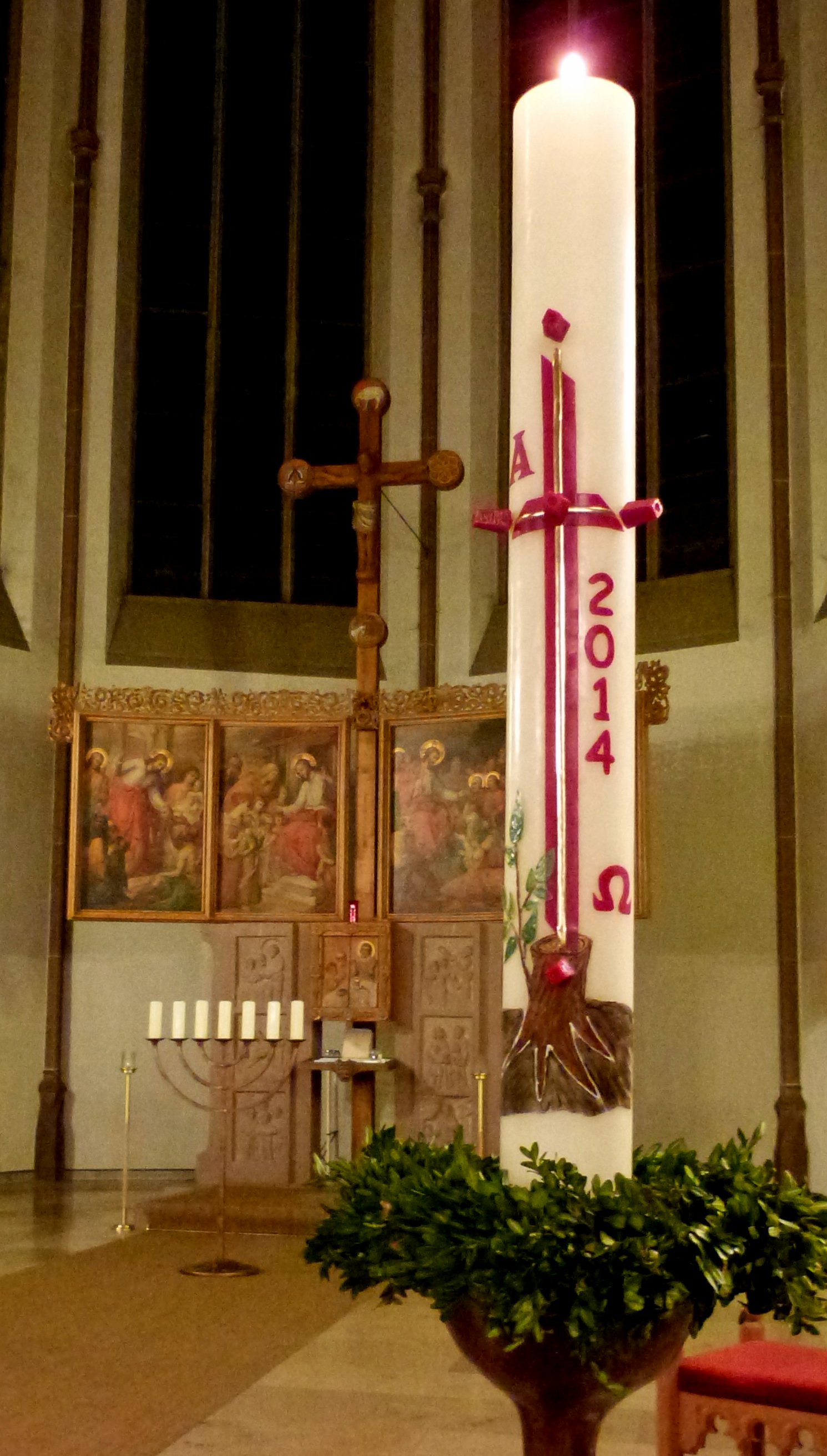 Brennende Osterkerze in der Osternacht Herz-Jesu-Kirche (Herne-Süd) 2014